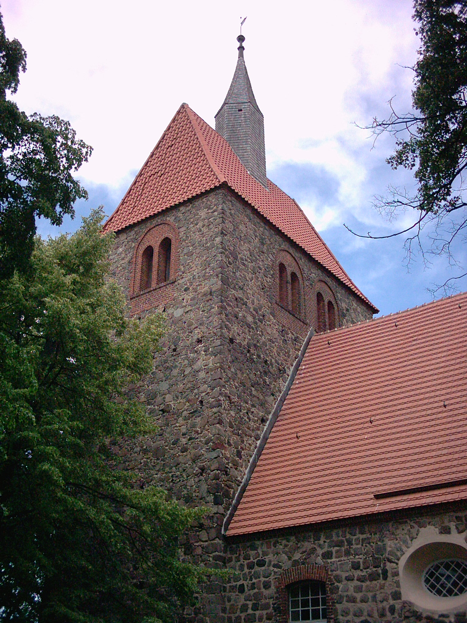 Kirche in Steinhöfel OT Arensdorf, Evangelisches Pfarramt Falkenhagen